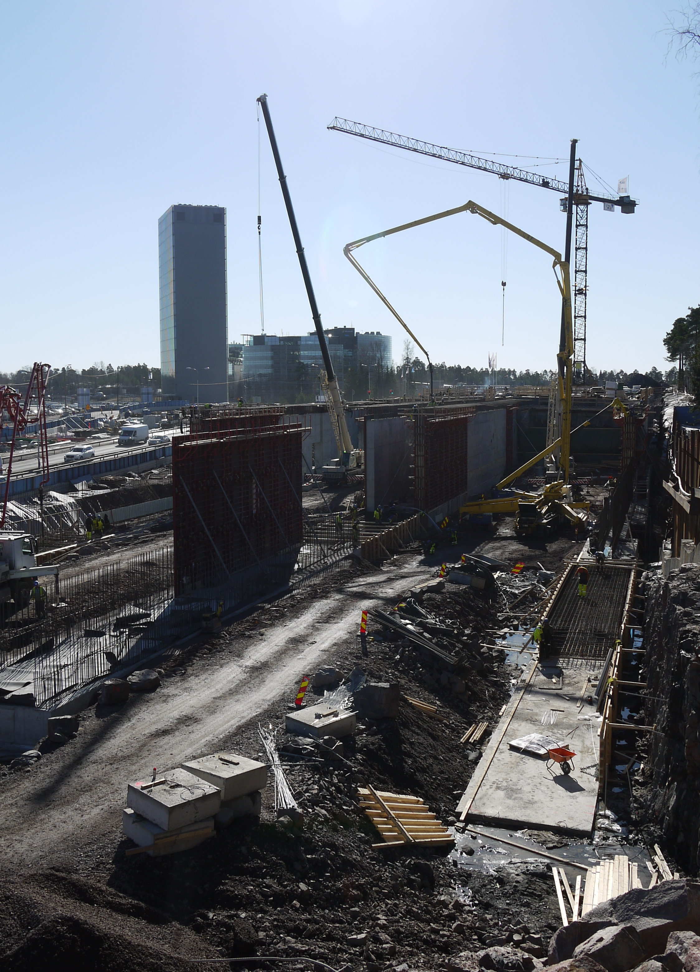 Kehä I:n tunnelityömaa Espoon Keilaniemessä maaliskuussa 2017.